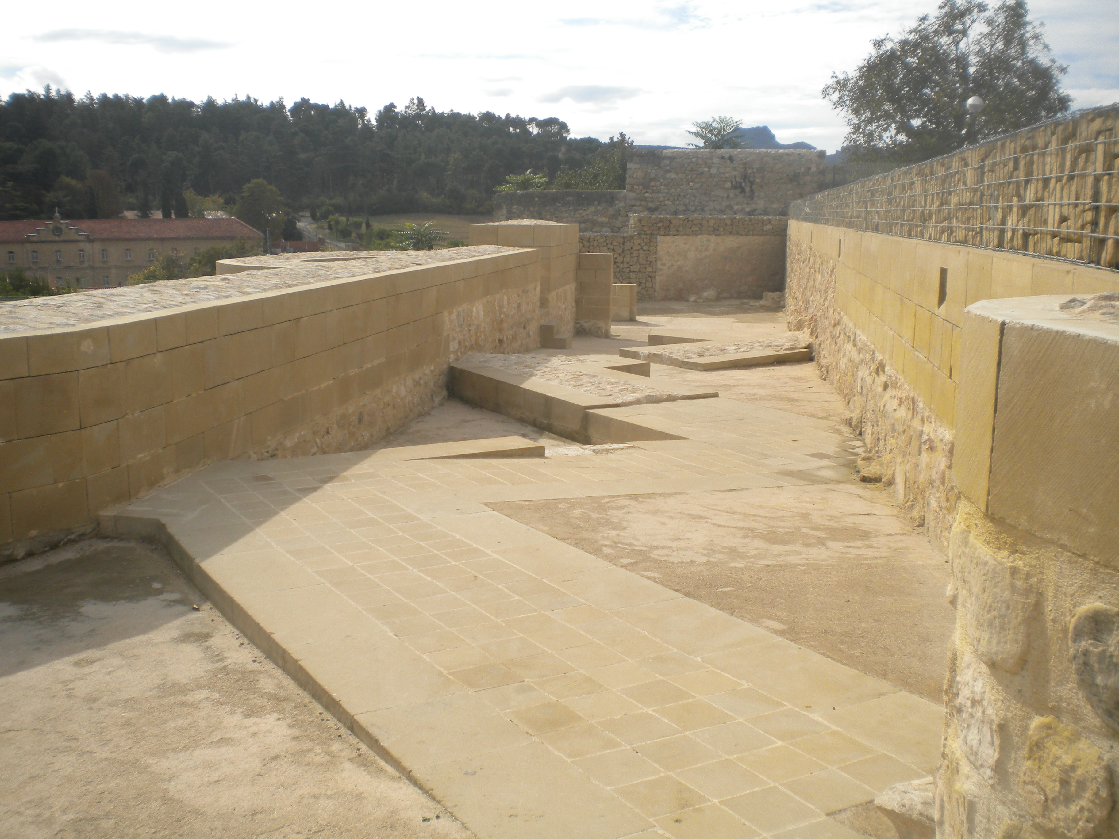 Redientes de la antigua estructura del Castillo de Miranda de Ebro (Castilla y León, España)